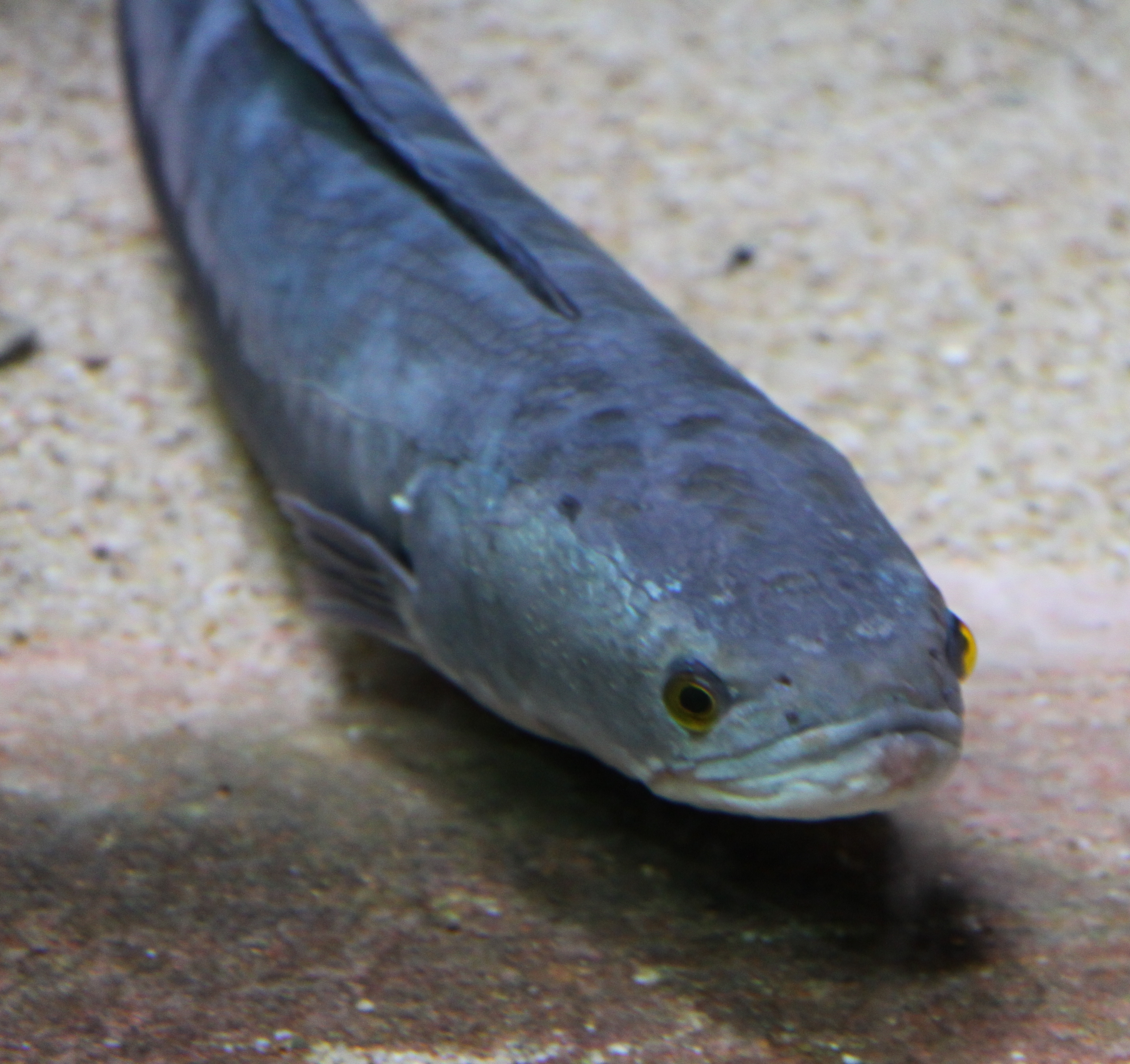 Tête de serpent à l'aquarium tropical de la porte dorée à Paris.